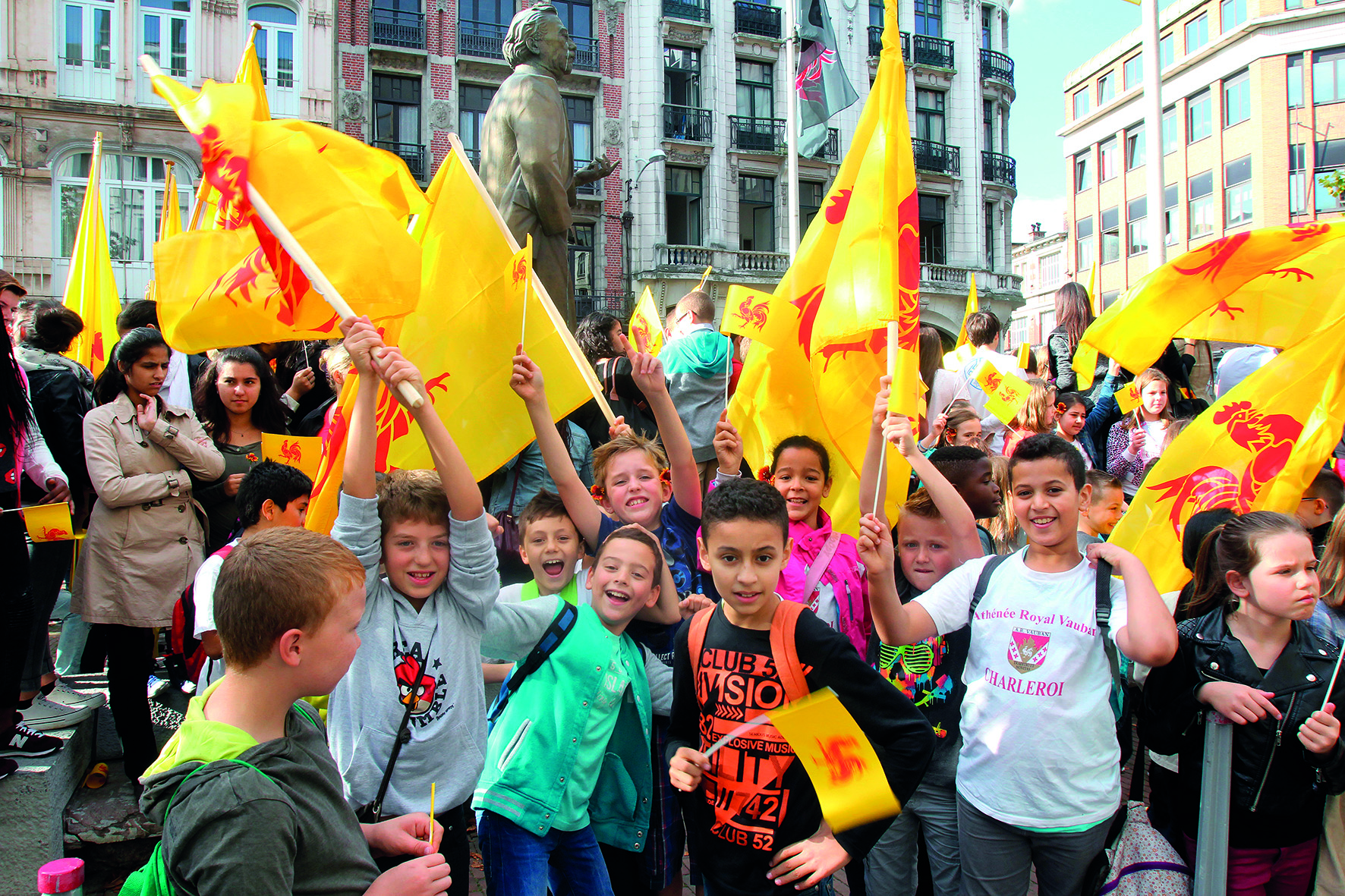 Big Five - fête de Wallonie Charleroi